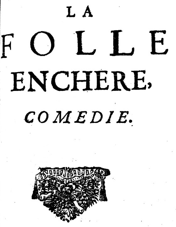 Page de titre de La Folle Enchère, Paris, chez la veuve de Louis Gontier, 1691